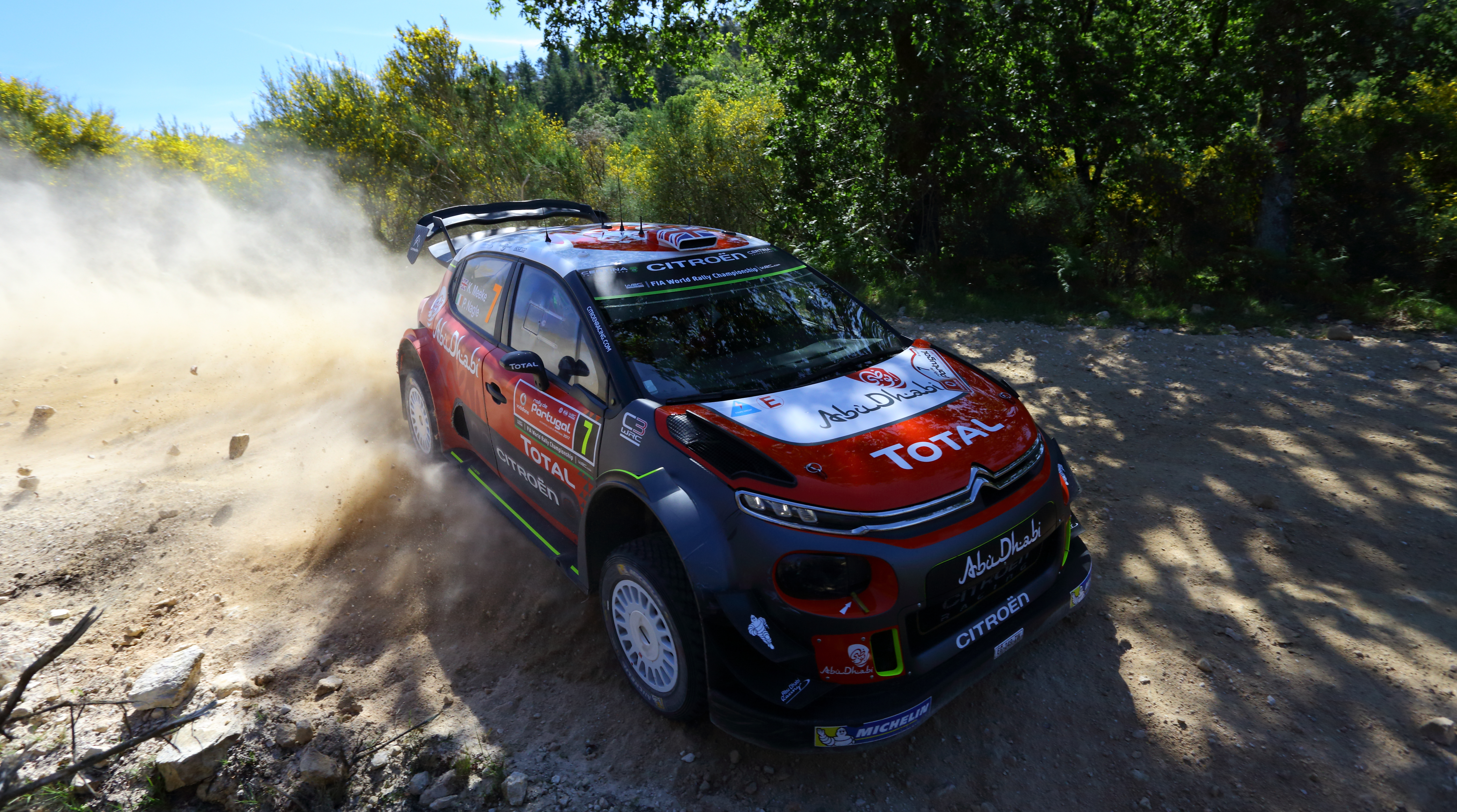 2017 Rally de Portugal